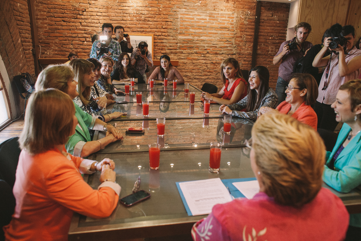 Reunión con parlamentarias Nueva Mayoría 23/11/2013